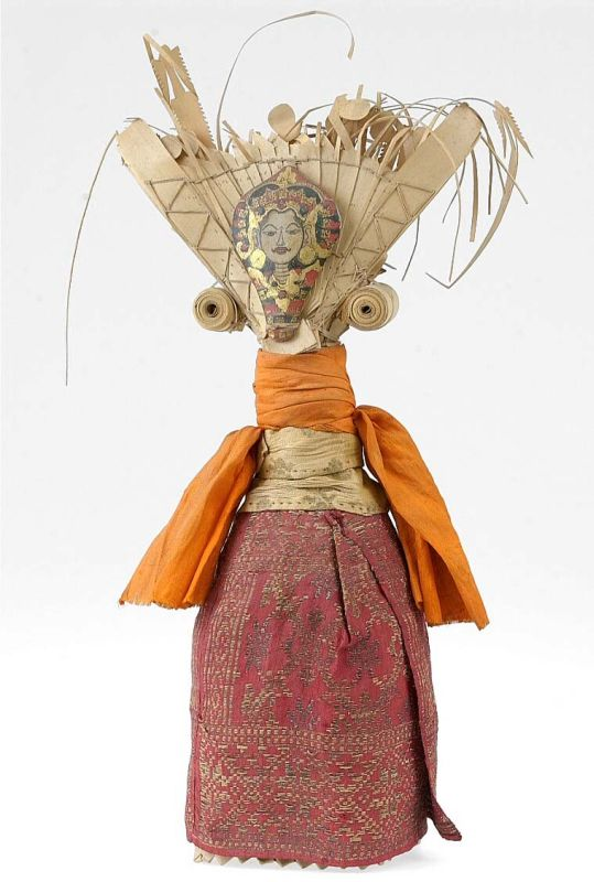 Pop. Een drager met een geschilderde afbeelding, prerahi van een godin. info Francine Brinkgreve, 20-11-2008: Wie het voorstelt hangt helemaal af van het ritueel waarin zij werd gebruikt. Bij rijstrituelen, in de graanschuur e.d. zijn dergelijke cili’s inderdaad een afbeelding van Dewi Sri. Meestal heeft ze dan echter niet zo’n gezichtje. Die worden juist eerder gebruikt bij figuurtjes die er ook zo kunnen uitzien, maar die bij crematies of post-crematie rituelen de overleden persoon vertegenwoordigen. Of het zijn voorouderfiguren, bewaard in de huistempels. In het algemeen is een cili, als figuur of als motief (zoals op de lamak…) gerelateerd aan het menselijk leven en de voorouders, en soms, afhankelijk van de context, is zij Dewi Sri! . Pop van lontarbladrepen voorstellende de godin Dewi Sri Unknown language: Prerahi